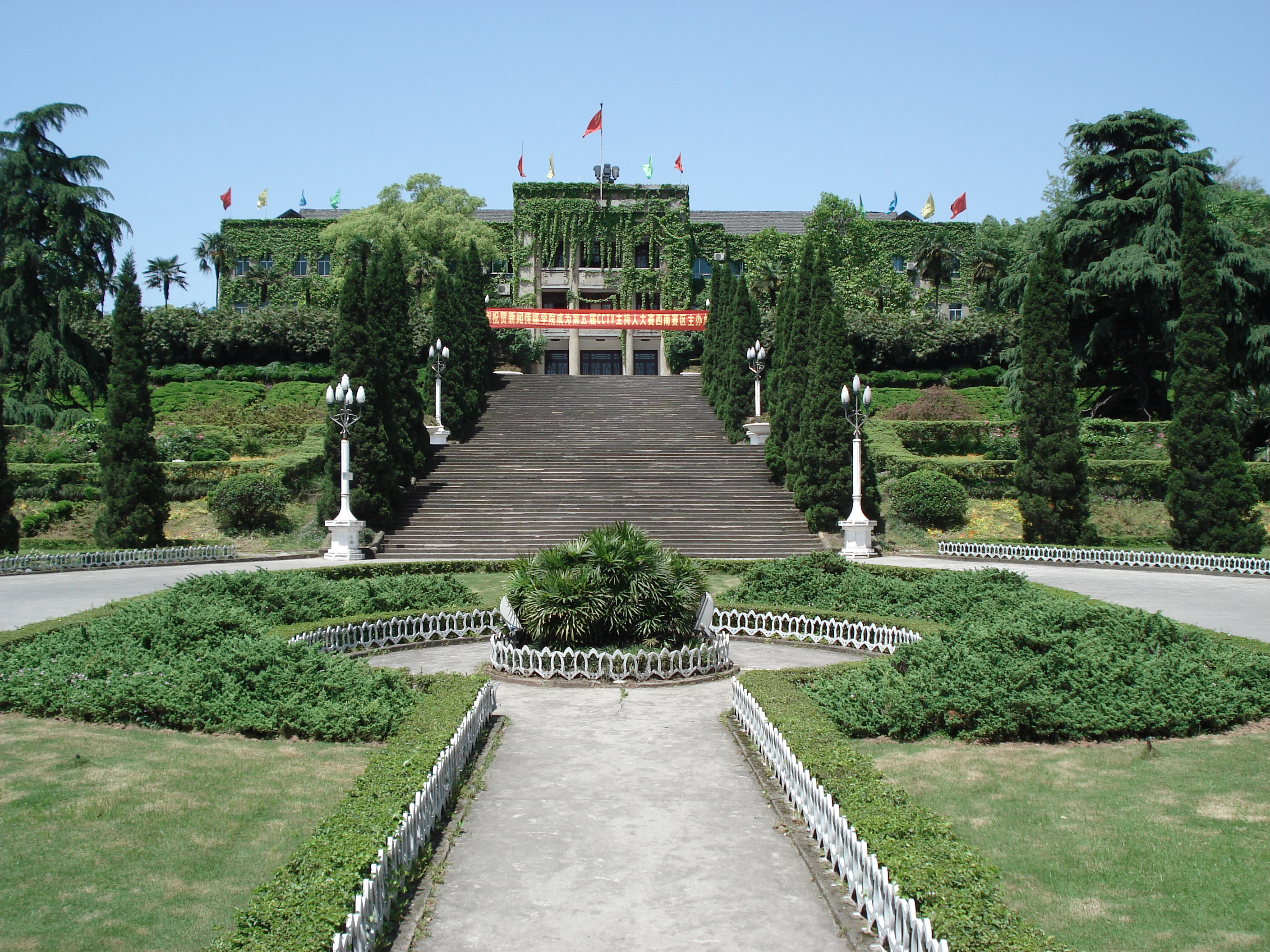 西南大學第一行政大樓（原川東人民行政公署辦公樓）